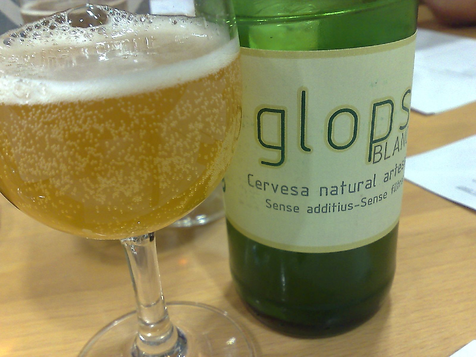 Cervesa Glops (Llúpols i Llevats, Cervesa artesana de l'Hospitalet)